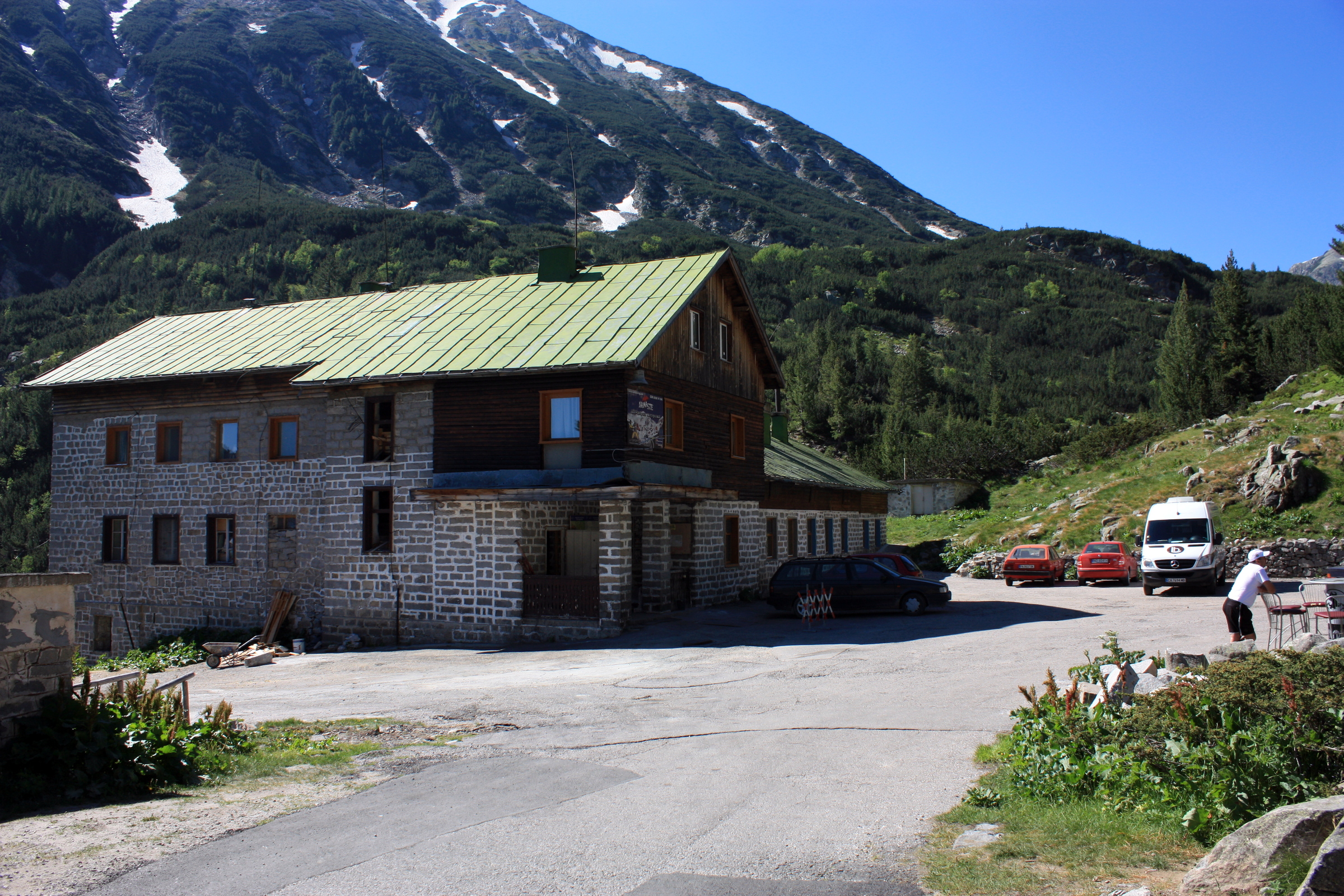 Piringebirge Hütte Wichren auf 1.950 m. Von hier besteht über den roten Wanderweg die Möglichkeit zum Wichren aufzusteigen.